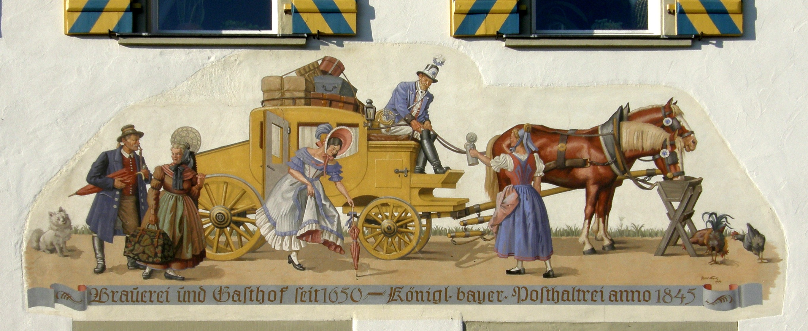 Fassadendetail der ehem. Posthalterei und Brauereigasthof zur Post an der Ecke Bahnhofstraße 5 und Fridolin-Holzer-Straße 4 in Weiler im Allgäu (Weiler-Simmerberg, Bayern, Deutschland)This is a photograph of an architectural monument.